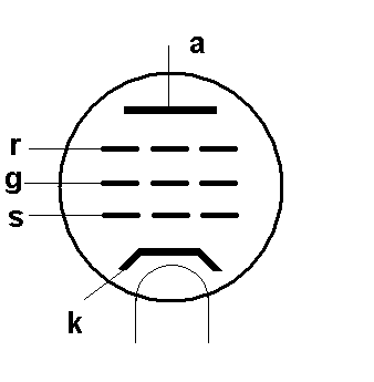 Pentode - eigen werk